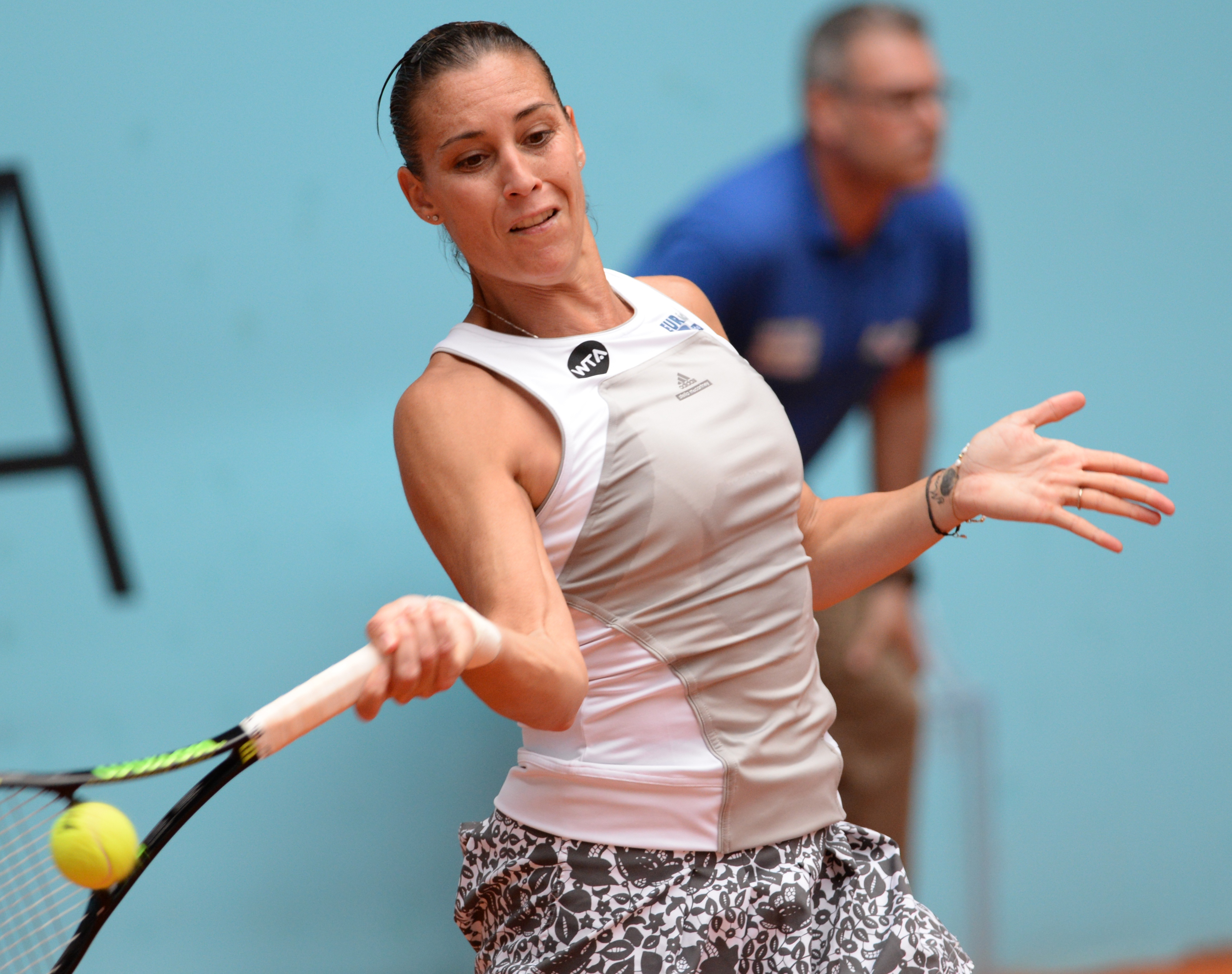 Flavia Pennetta